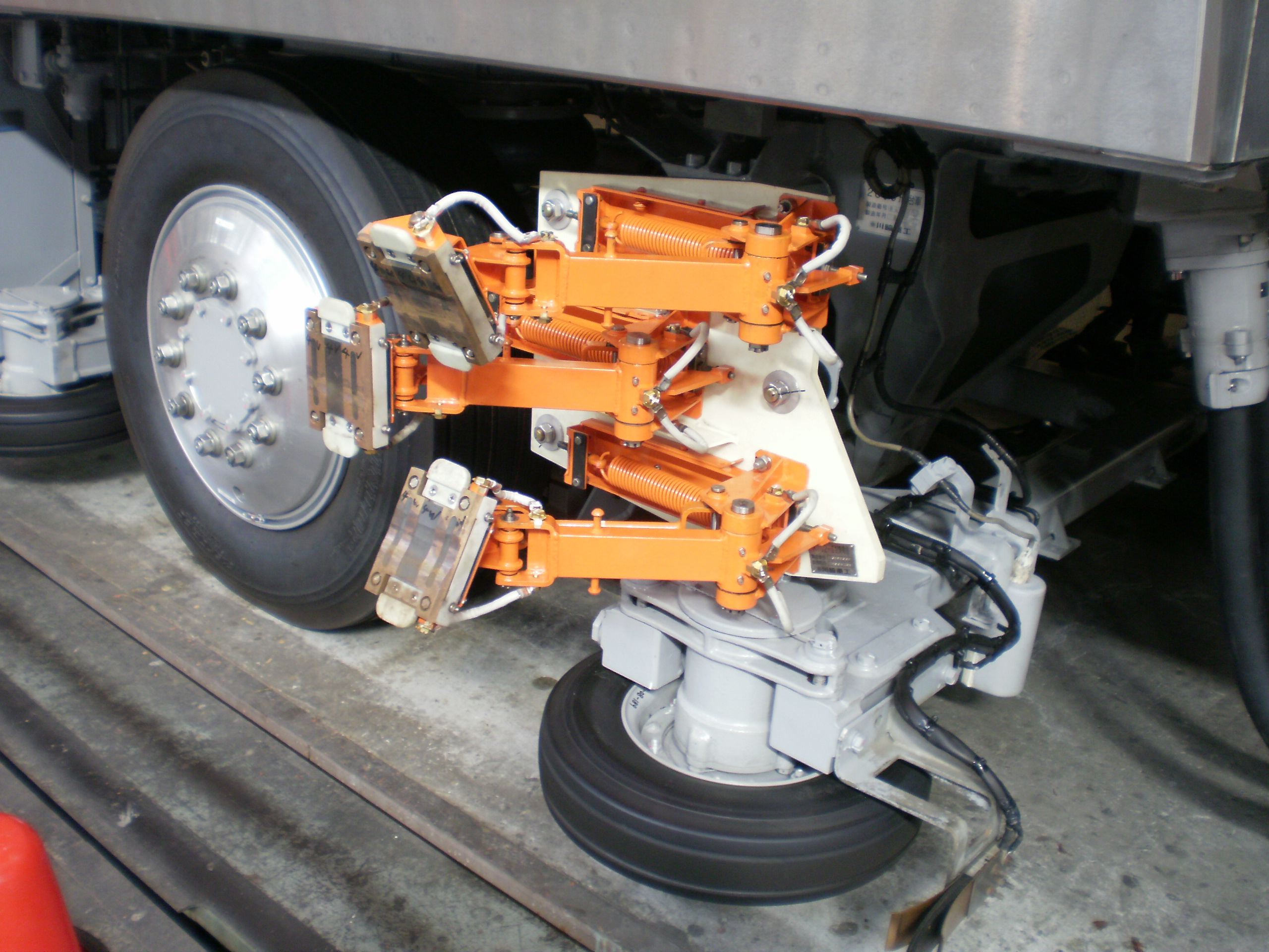 神戸新交通(ポートライナー)2000型04編成(2次車)2504の台車に設置されている集電装置。ポートライナーフェスティバル2012にて撮影。